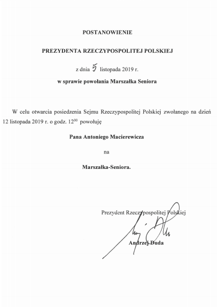 Postanowienie Prezydenta Rzeczypospolitej Polskiej Andrzeja Dudy o powołaniu Antoniego Macierewicza na stanowisko marszałka seniora